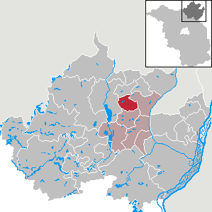 Grünow in Brandenburg (Country) - District Uckermark